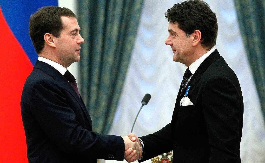 Дмитрий Медведев, Сергей Маковецкий. Церемония награждения орденом Почёта